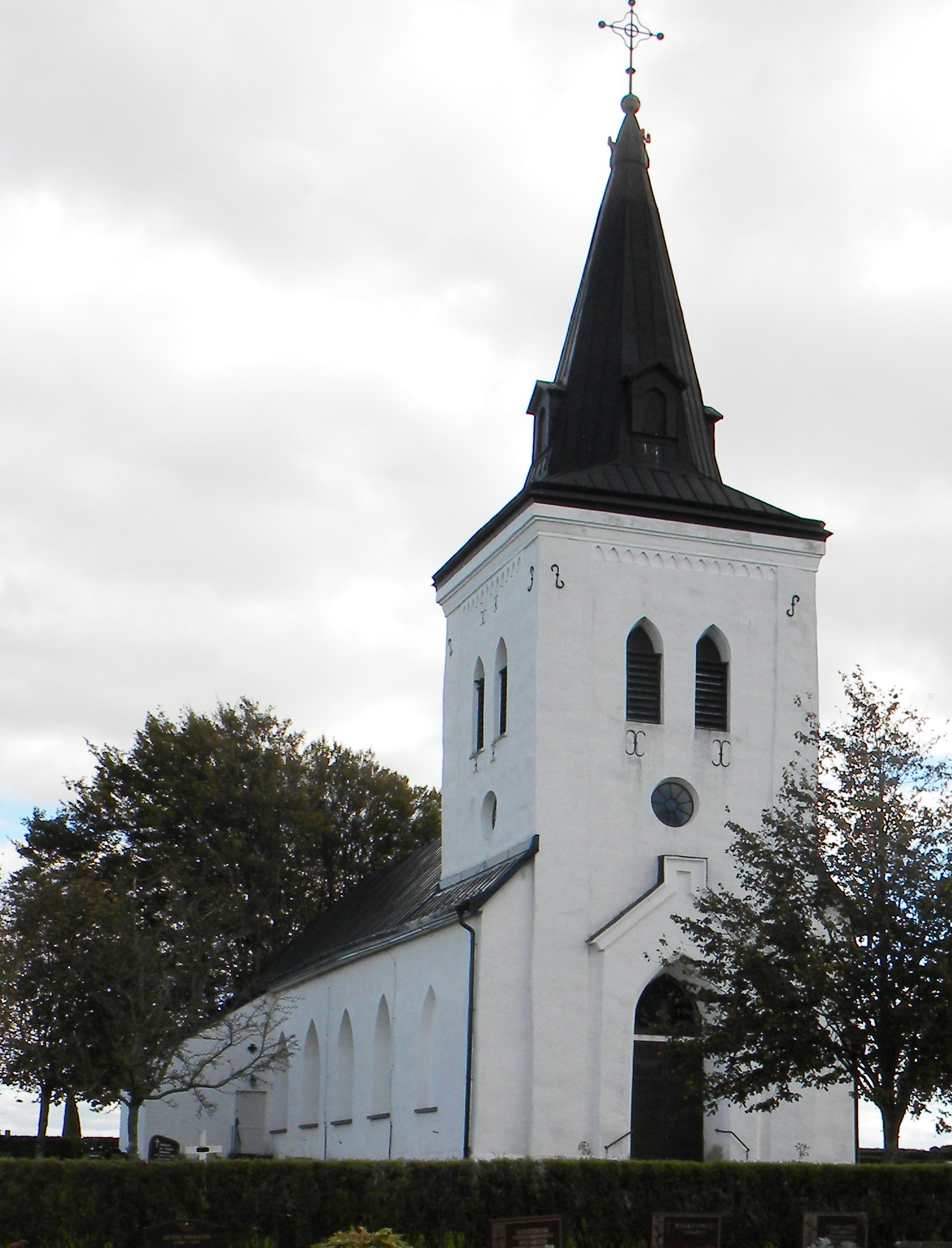 Vapnö kyrka